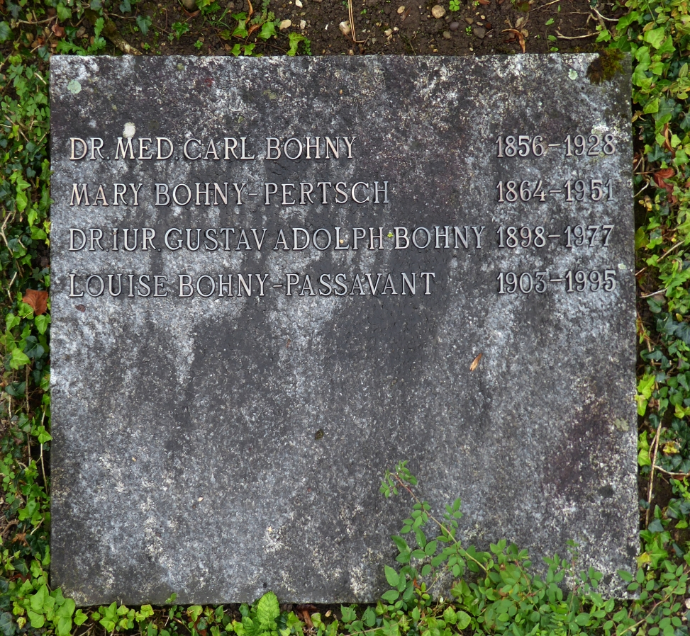 Gustav Adolf Bohny (1898–1977) Jurist, Notar, Präsident des Schweizerischen Roten Kreuzes, SRK. Grab auf dem Friedhof Wolfgottesacker, Basel